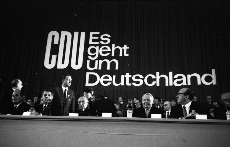 CDU - Bundesparteitag in Düsseldorf